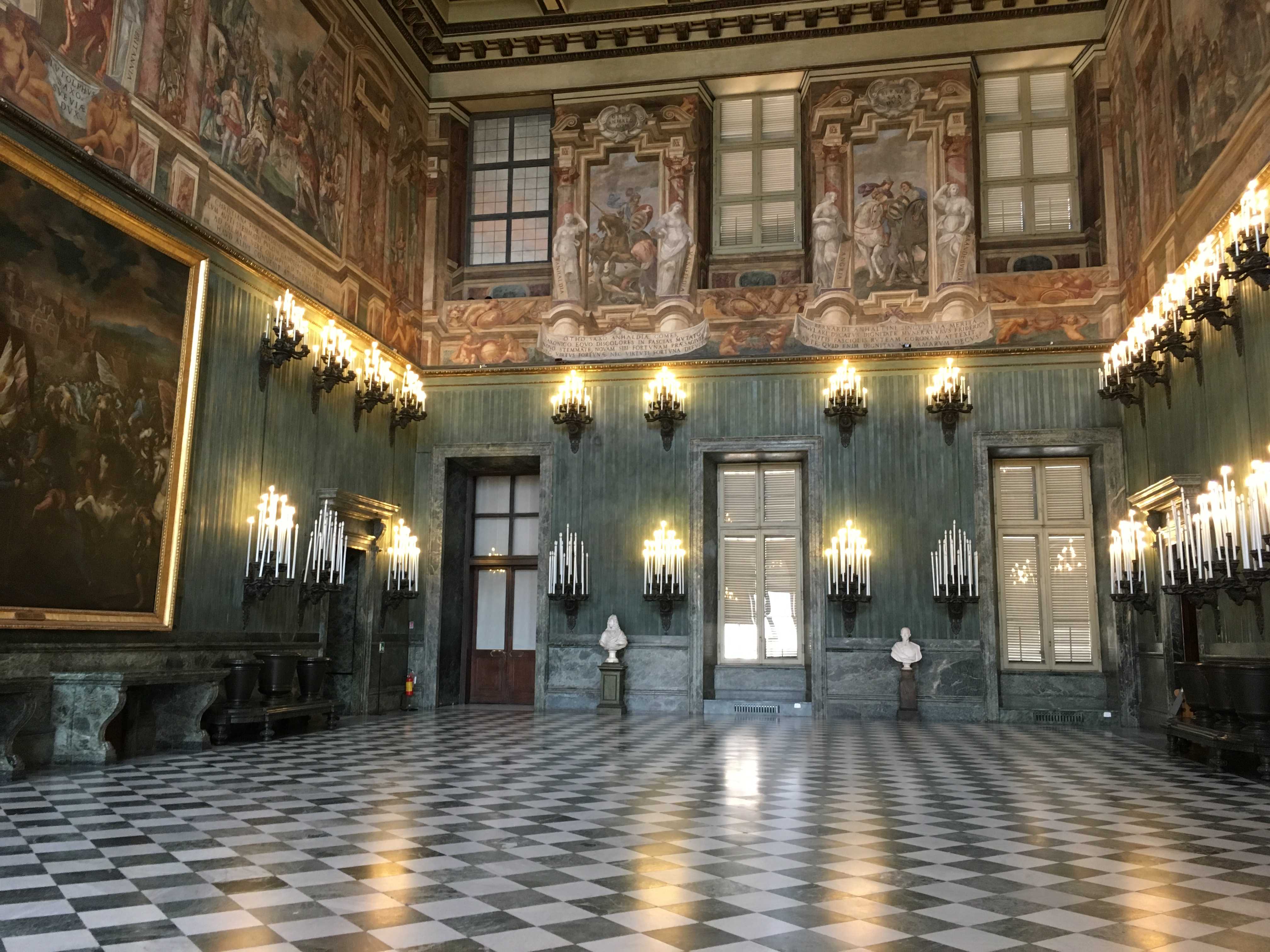 Salone della guardia svizzera Palazzo reale